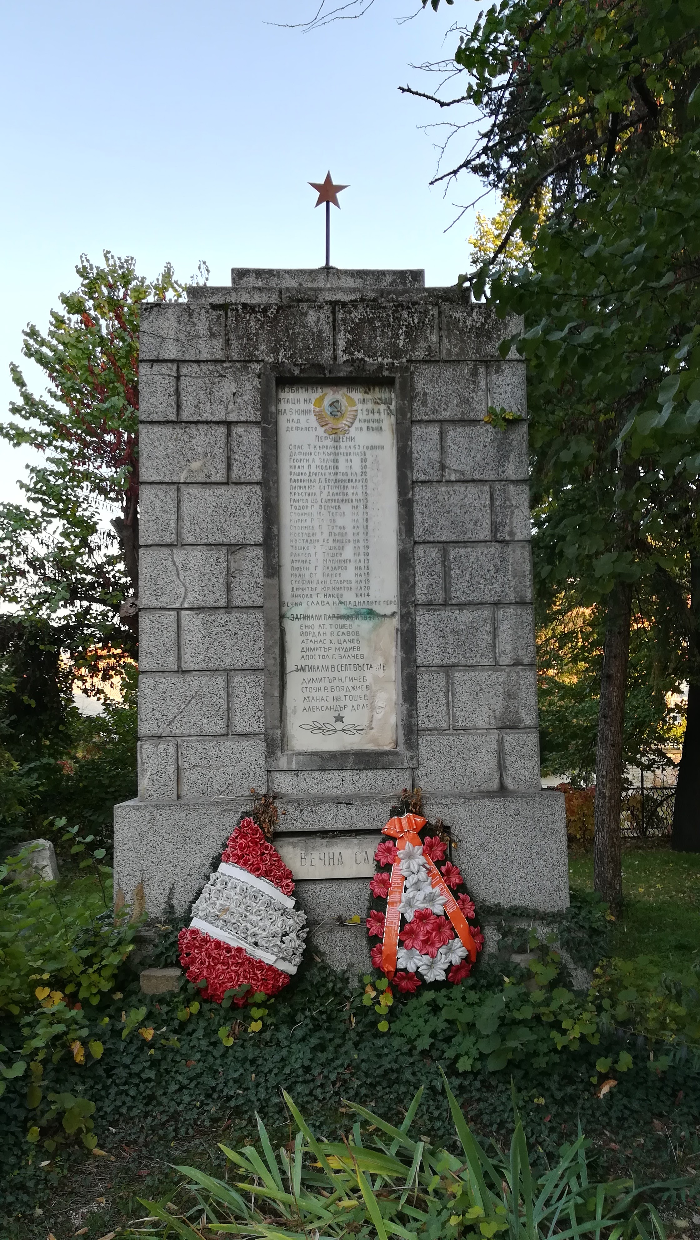 Антифашистки паметник - Перущица